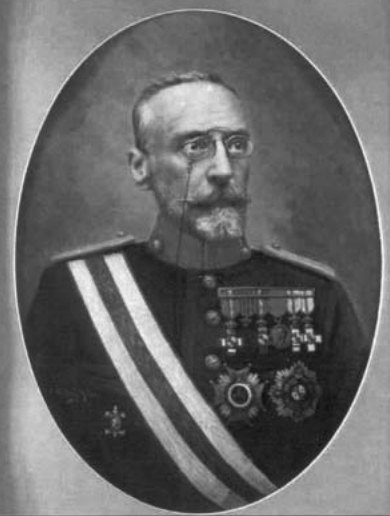 Atanasio Torres Martín es un militar español autor de la Balística Exterior y numerosos folletos y artículos